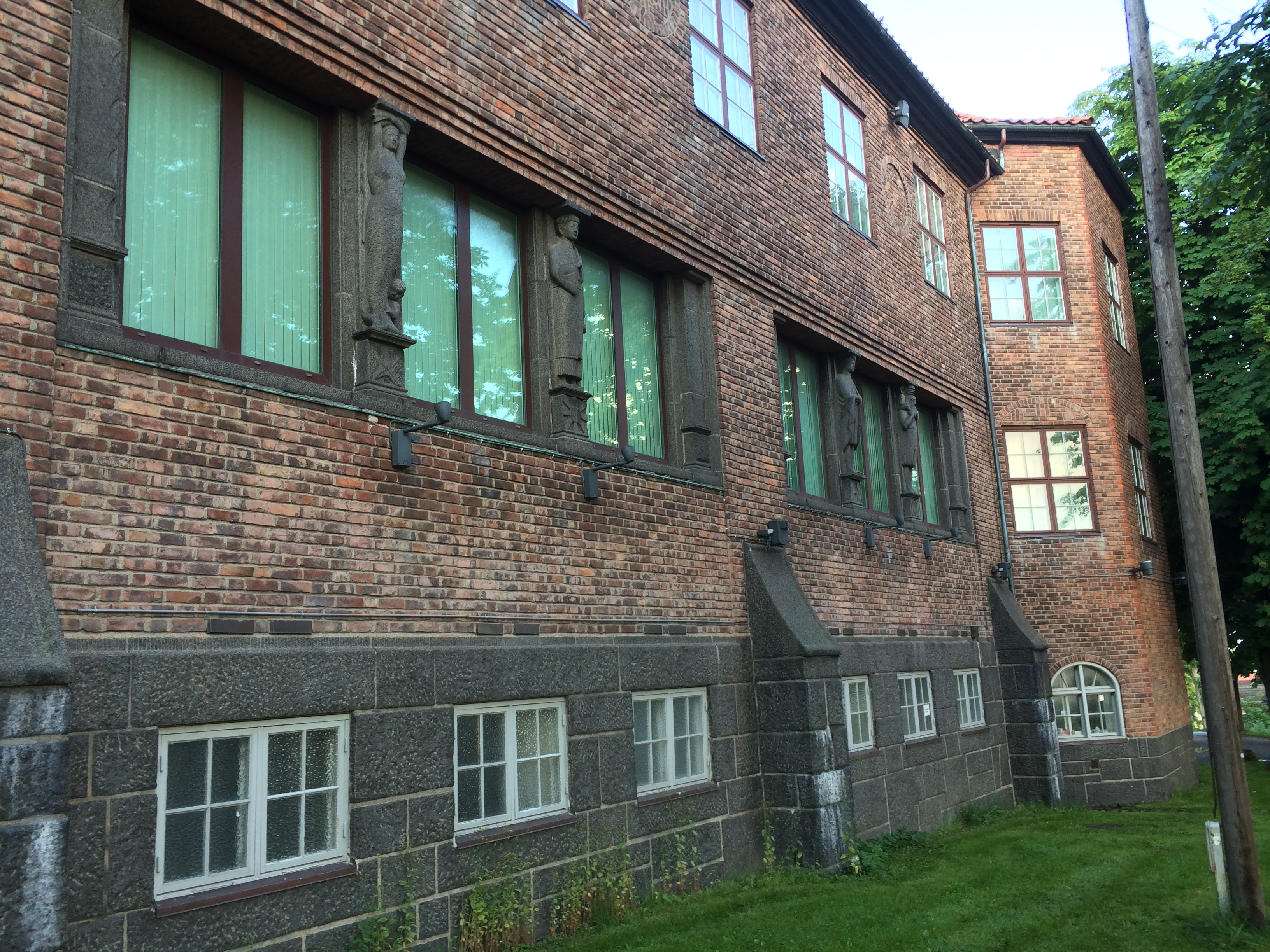 Haugar Vestfold Kunstmuseum i juni 2014. Bygningen ble bygd 1918–1921 som Tønsberg navigasjonsskole (Tønsberg sjømandsskole) på Haugar/Møllebakken i Tønsberg i Vestfold. Arkitekter: Andreas Bjercke og Georg Eliassen. Utsmykning: Tolv karyatider av Wilhelm Rasmussen 1920-1922.